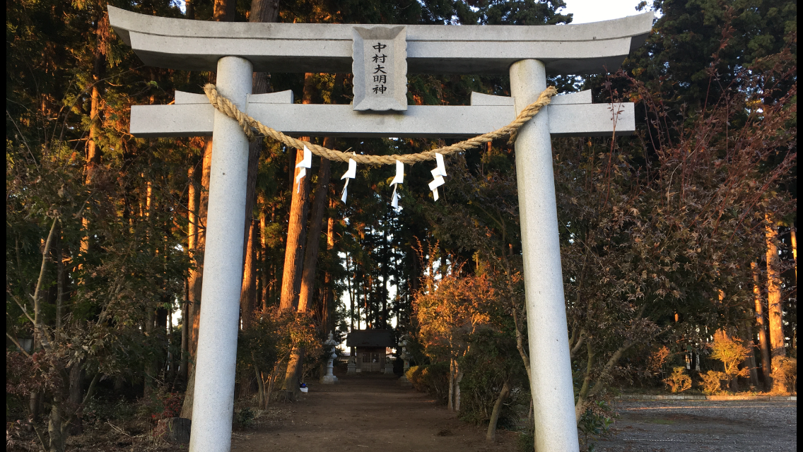 中村大明神